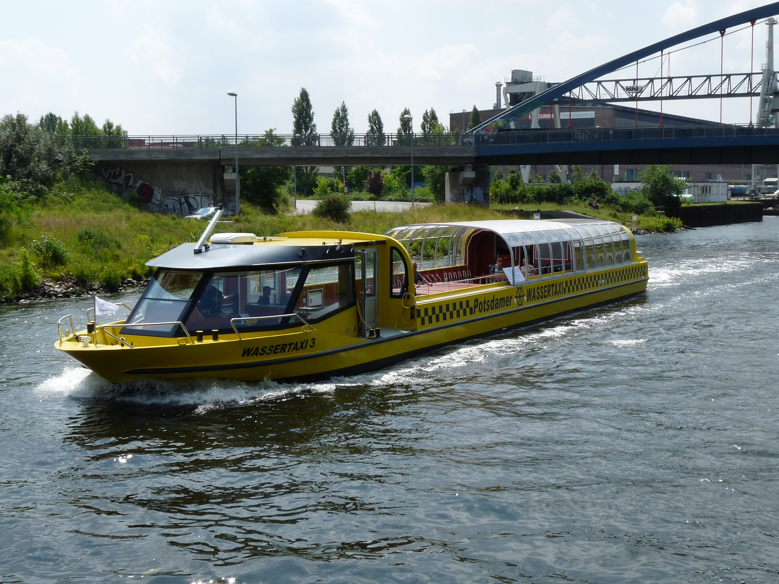 Das Wassertaxi 3 auf der Überführungsfahrt von der Bauwerft nach Potsdam im Silokanal.